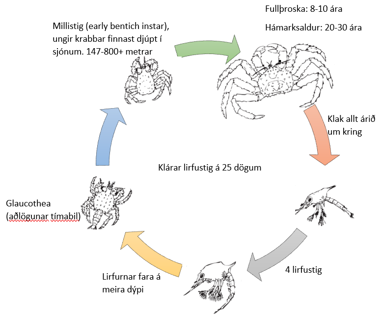 Lífsferill Gullkóngakrabbans